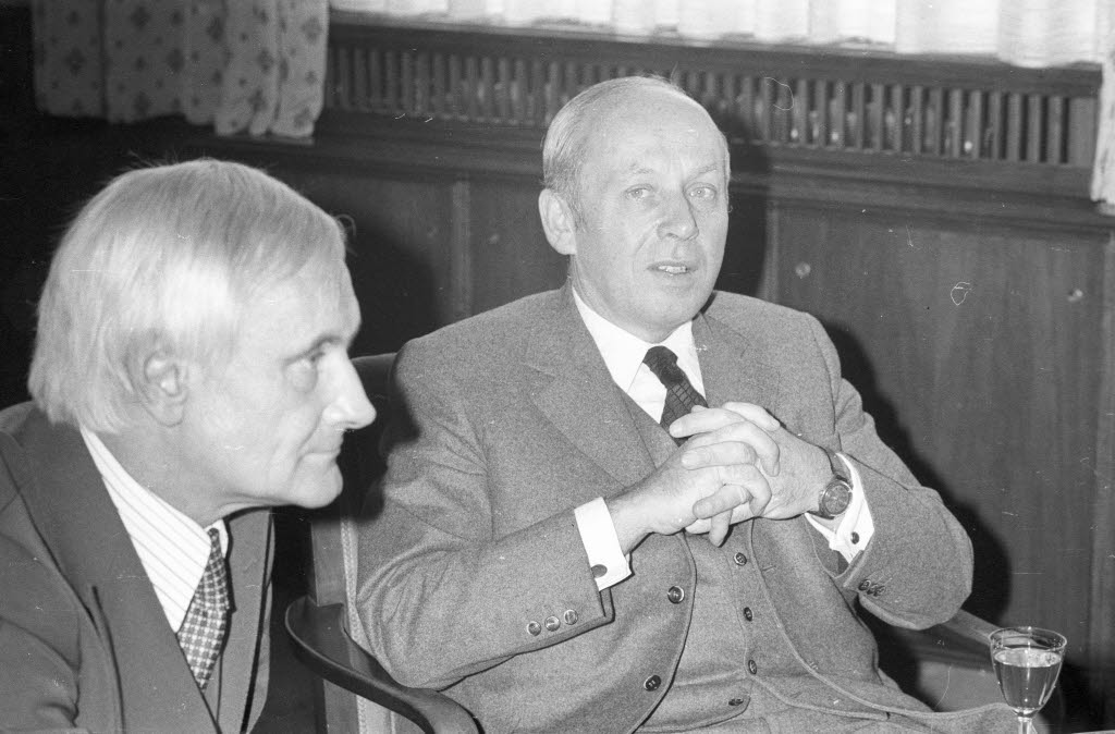 Der deutsche Generalkonsul Blumenfeld in Leningrad (rechts) tauscht sich mit Bürgermeister Hans-Joachim Barow (links) aus. Thema der Gespräche sind u.a. die Beziehungen zwischen den beiden Segelolympiastädten Kiel und Tallin.